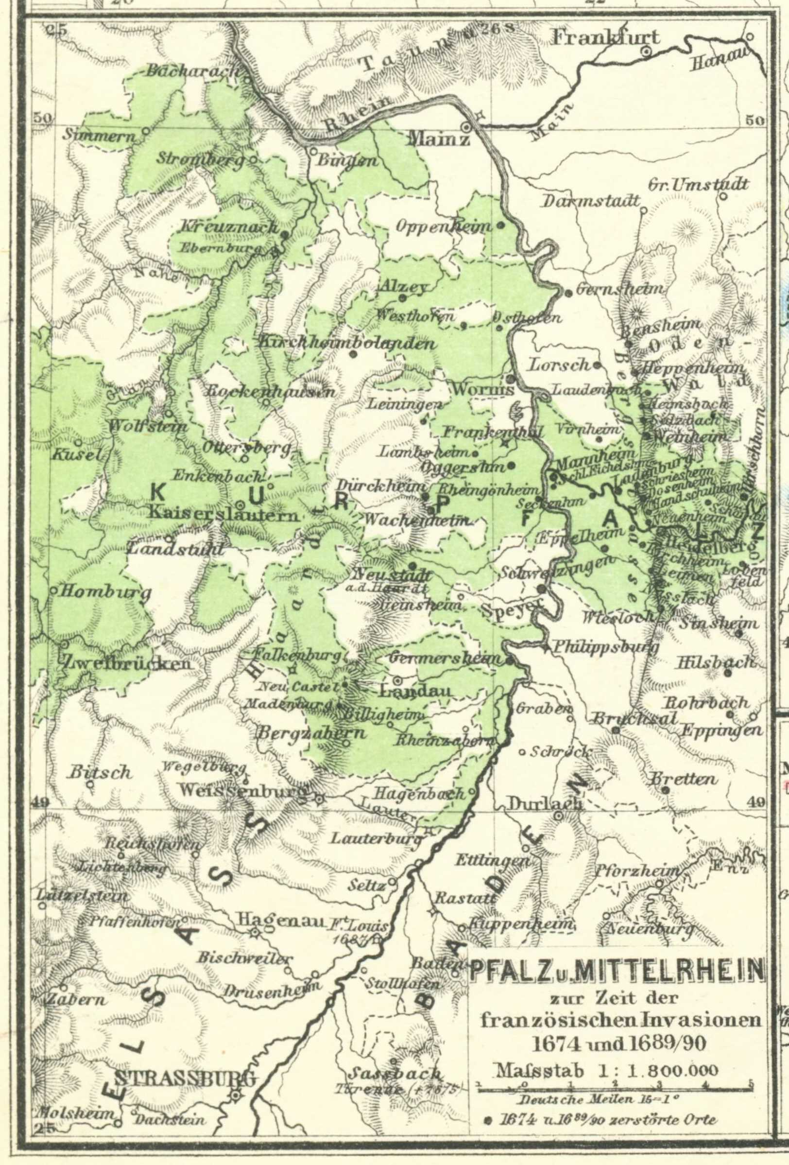 Pfalz und Mittelrhein zur Zeit der französischen Invasionen 1674 und 1689/90